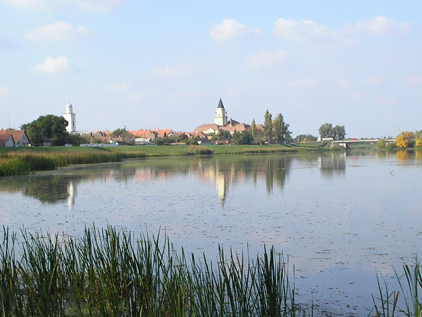 Mezőtúr a Berettyón túl